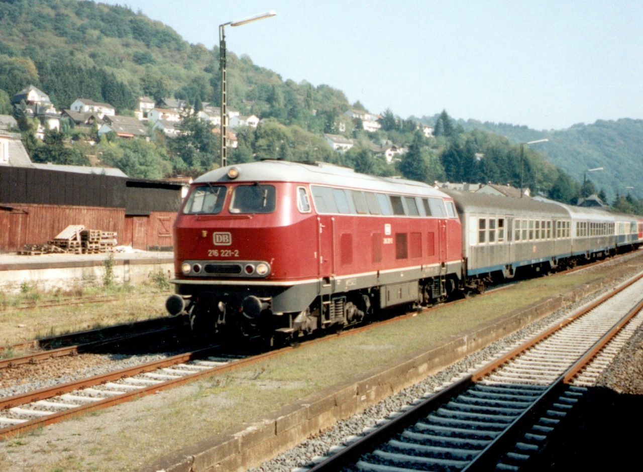 216 221 fährt am 24.09.1998 mit RB 6944 Weilburg - Koblenz in den Bahnhof Nassau(Lahn) ein.